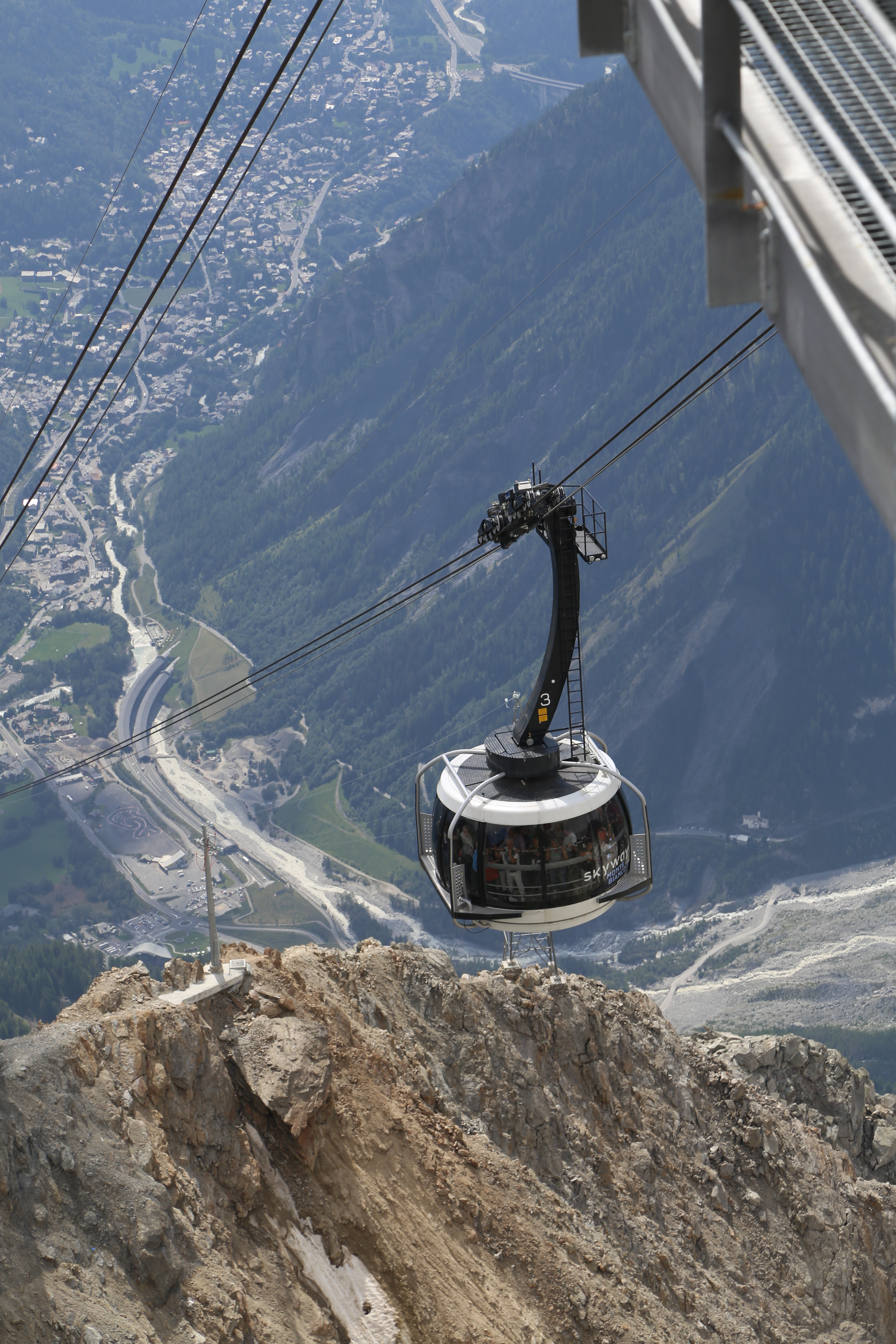 Skyway Monte Bianco, Punta Helbronner, Courmayeur, Aostatal